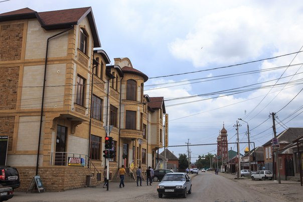 По улице города Шали